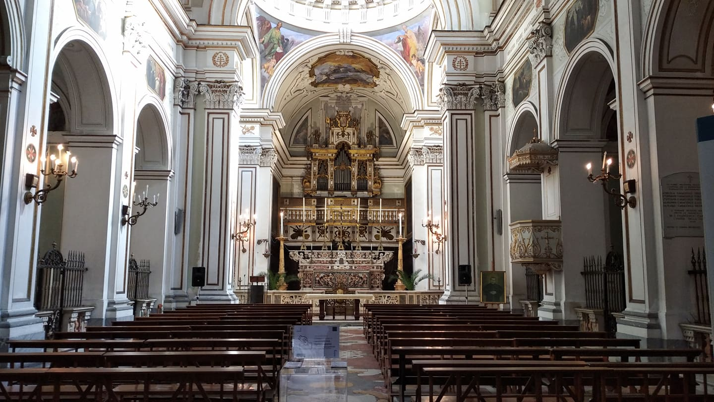 Chiesa di Monteverginella (Napoli)